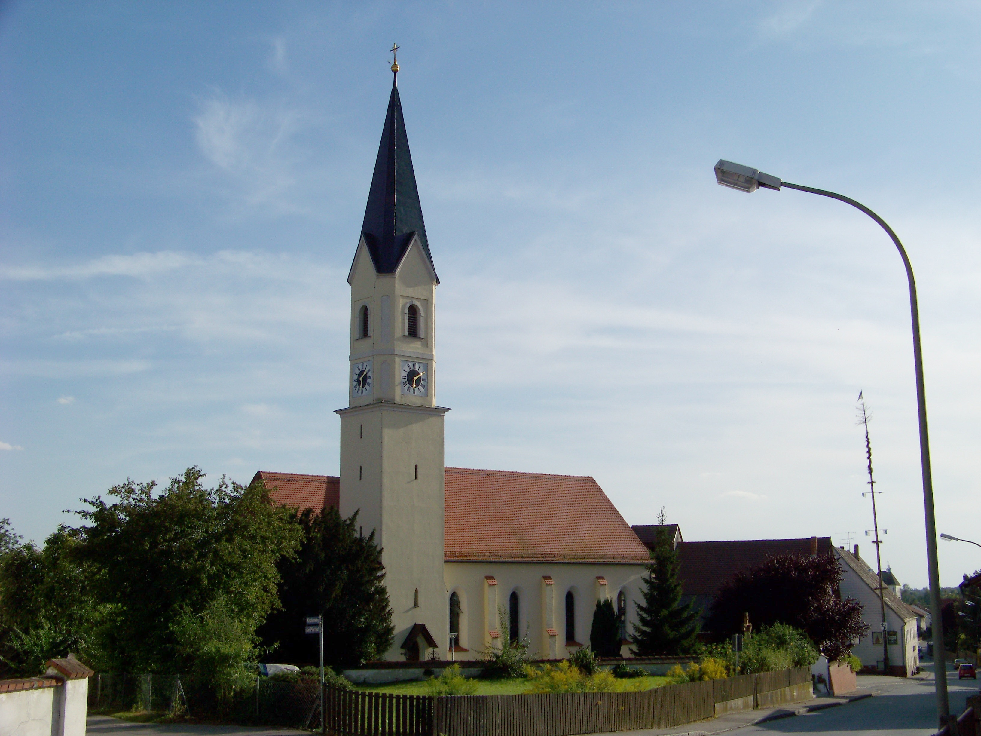 Kirche St. Maria Postau